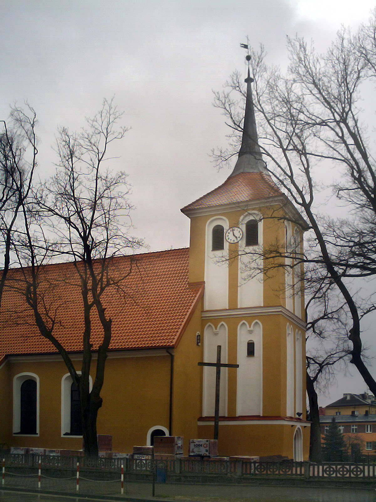 Kościół p.w. Królowej Korony Polskiej w Orzyszu (zabytek nr A-906)